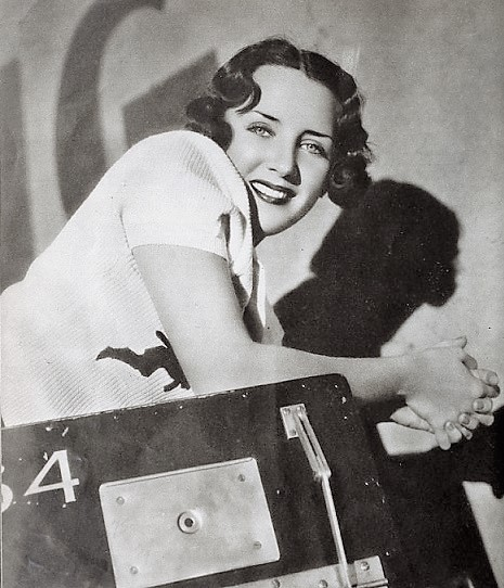 Susan Fleming